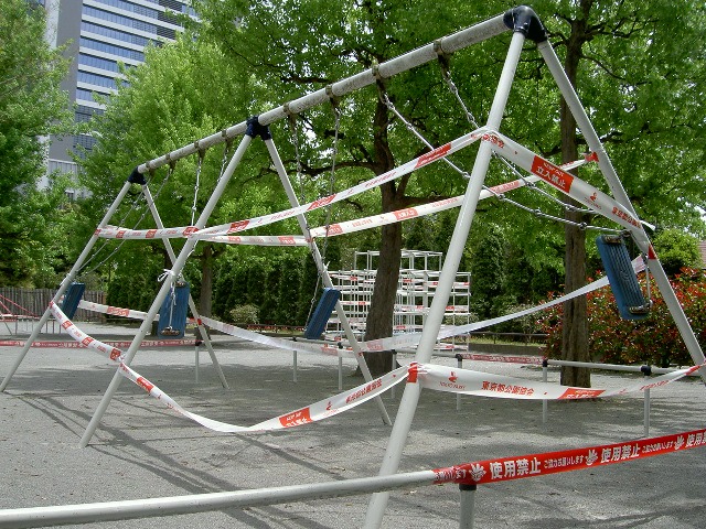 新型コロナウイルスで閉鎖中の旧芝離宮併設児童公園